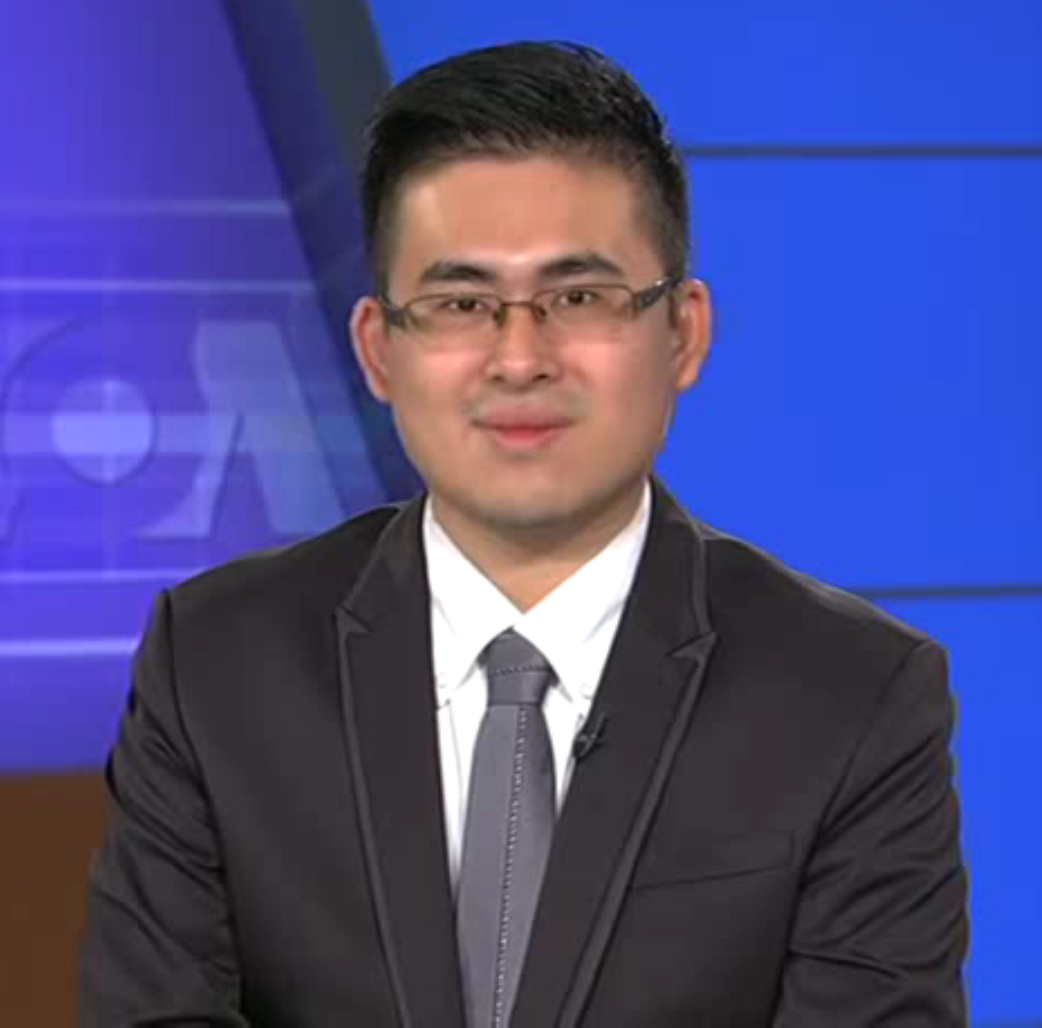 王炳忠做客VOA衛視